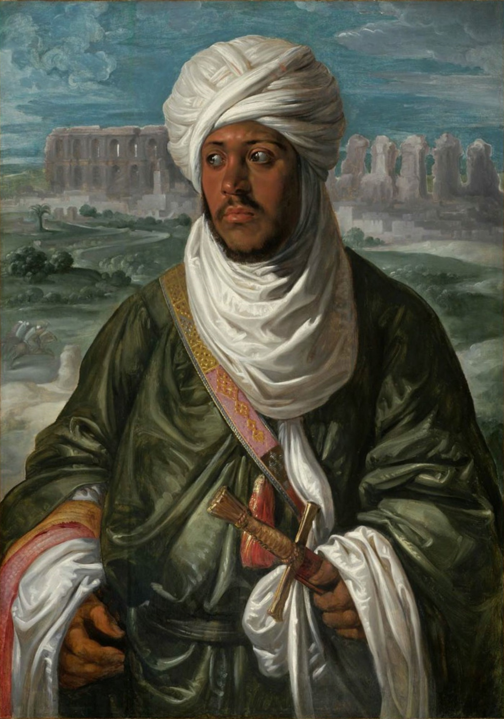 Mulay Ahmed de Tunis, dernier sultan Hafside de Tunis, en 1535, lors de l'expédition de Charles Quint à Tunis en 1535.